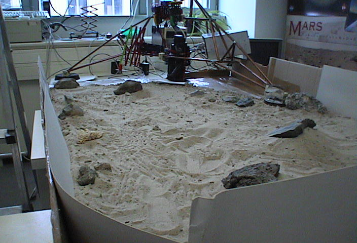 Hunveyor-1 terepasztal (ELTE-TTK, Budapest)